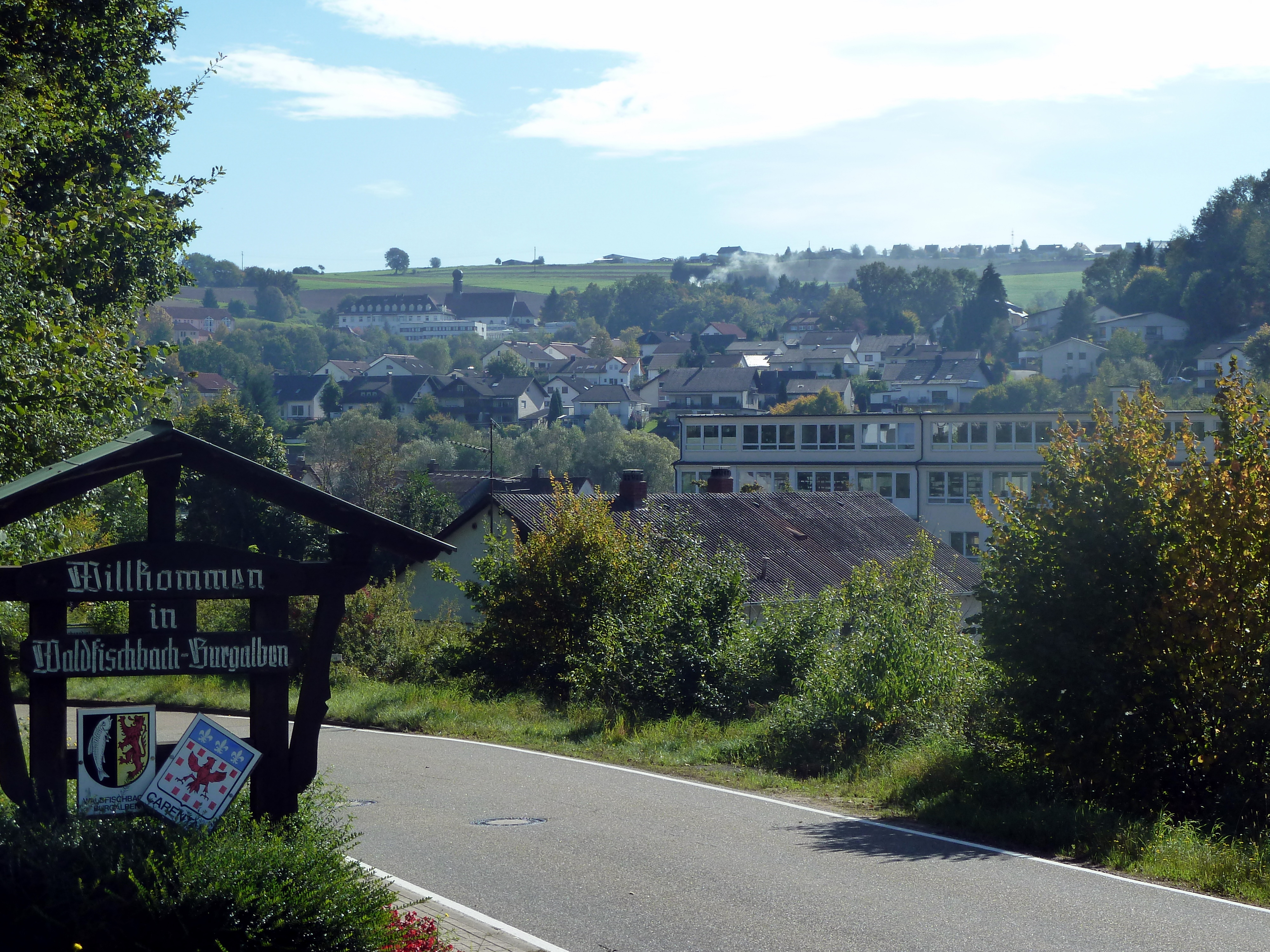 Waldfischbach-Burgalben von Höheinöd kommend